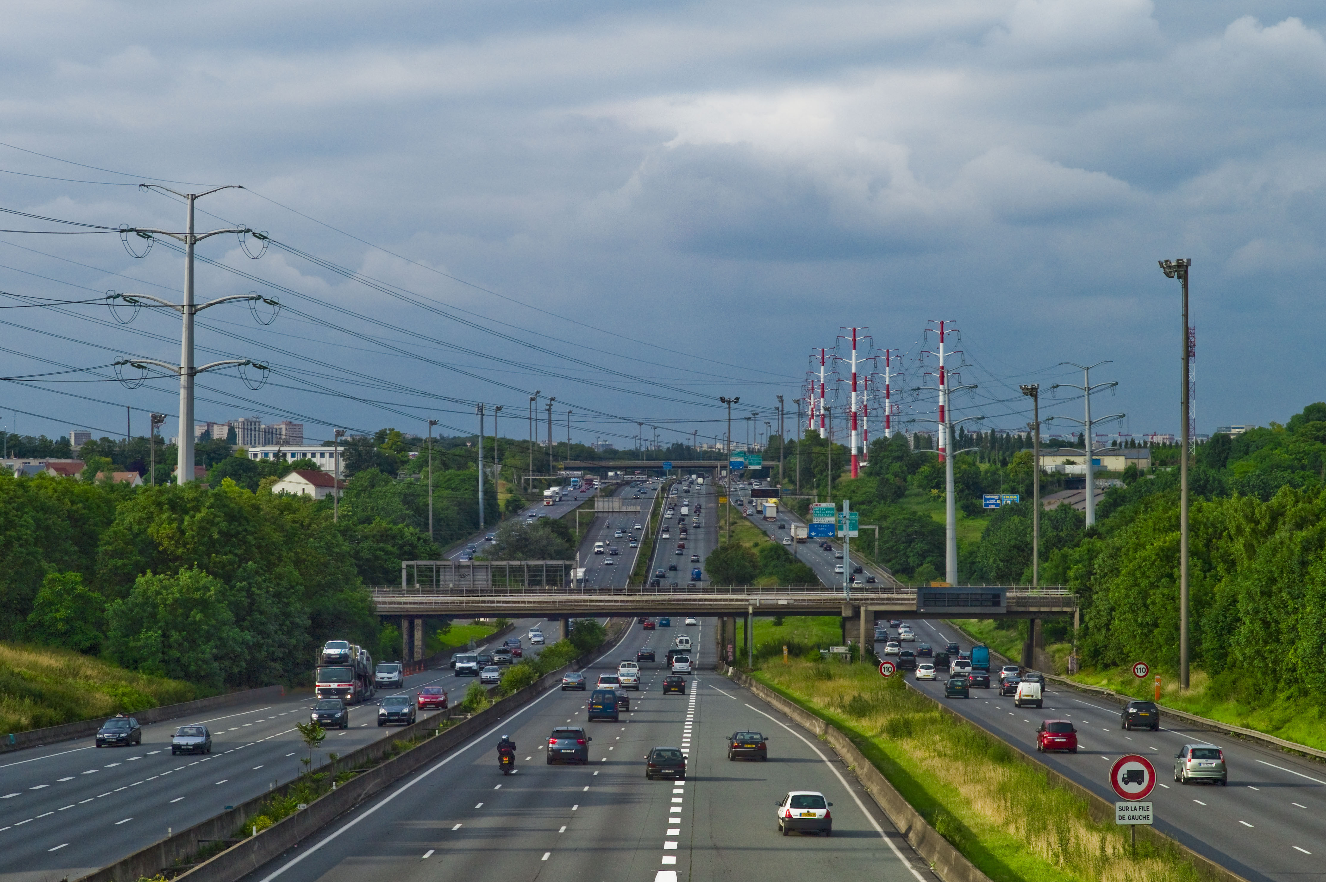 L'autoroute A6 (autoroute du Soleil), vue vers Paris, à Wissous.